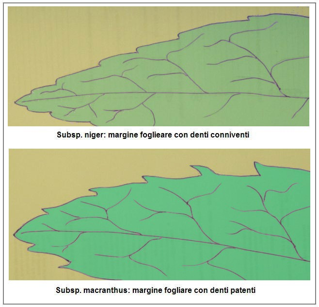 Helleborus niger - Denti delle sottospecie